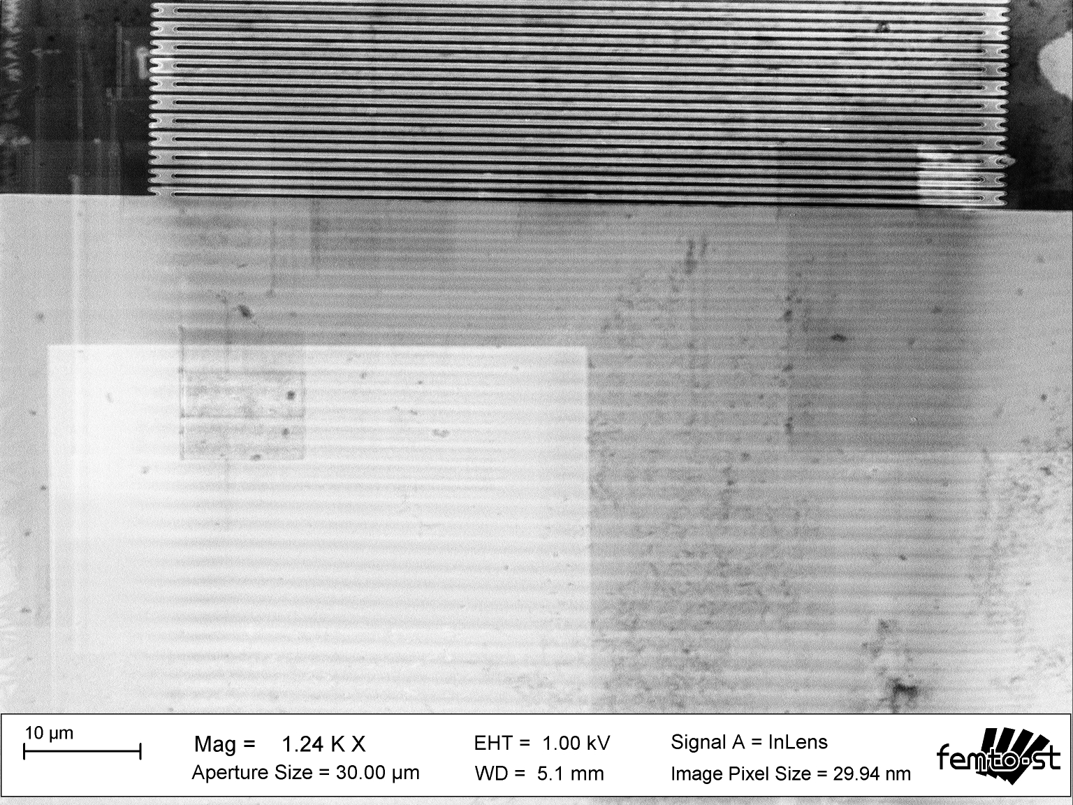 puissance +15 dBm fréquence 2400 MHz le transducteur interdigité est visible en haut de l'image